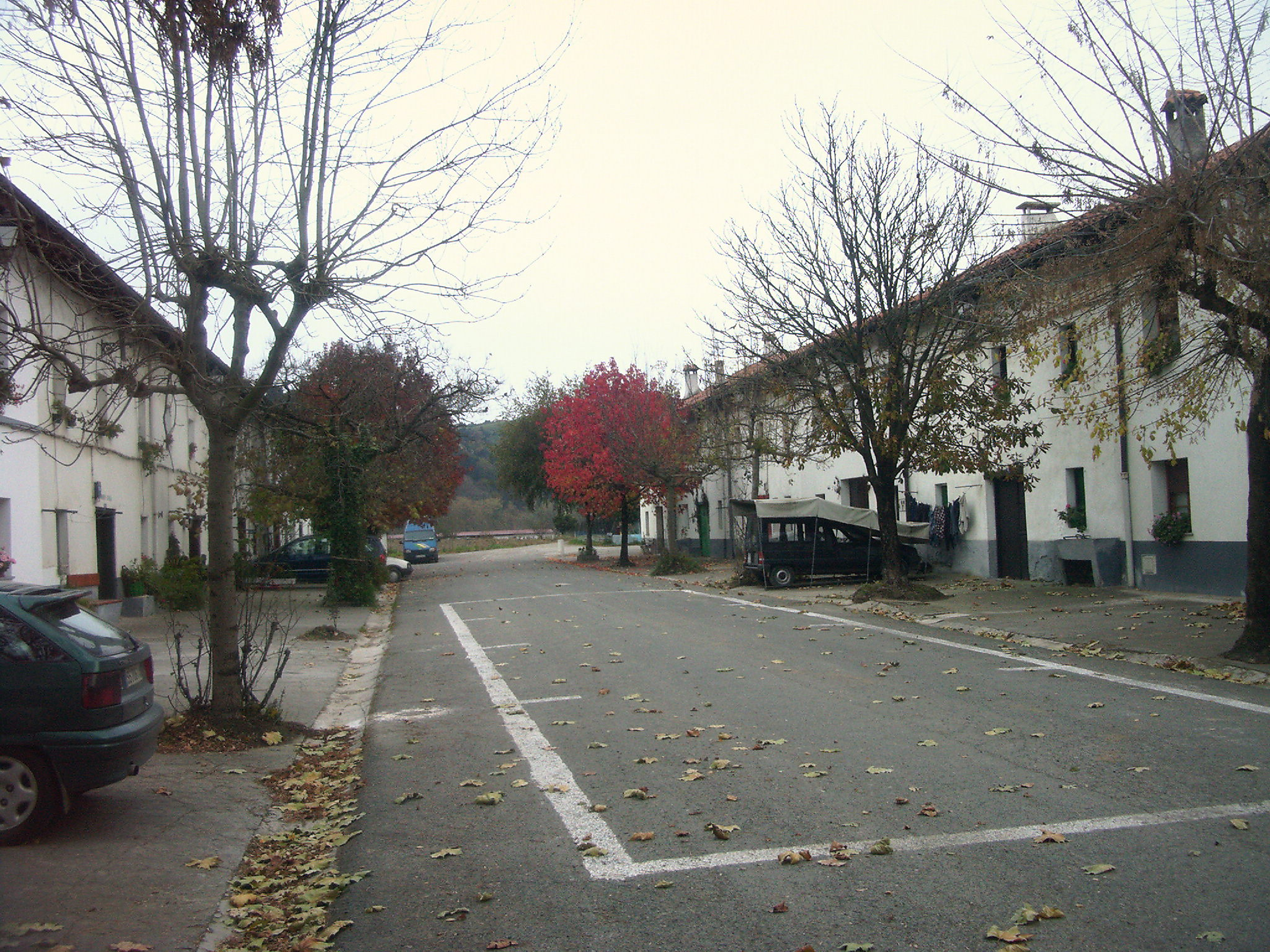 Iraetako hamasei baserri atxikiak.